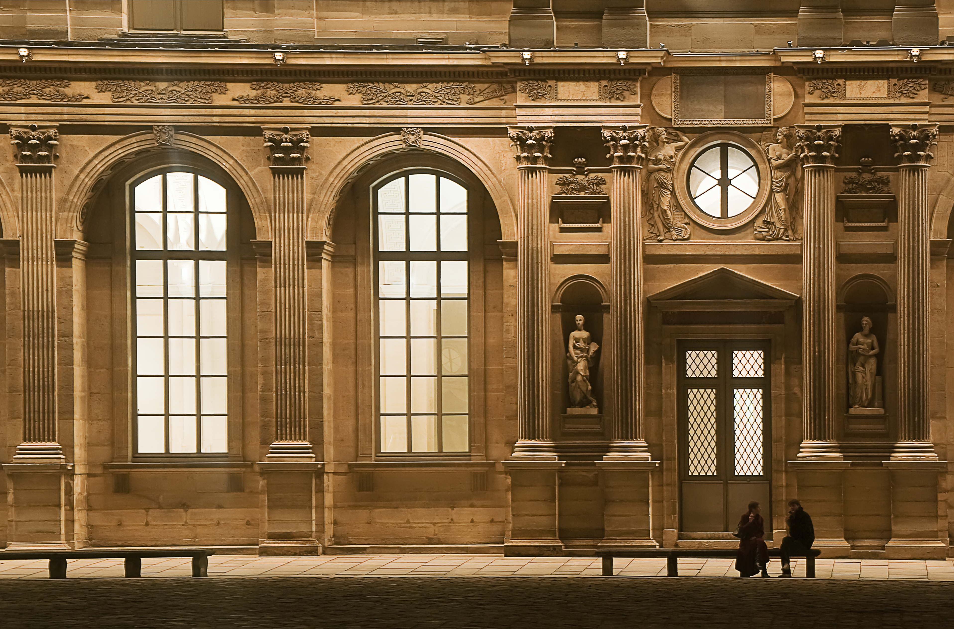 Amants de nuit sur un banc devant une porte de l'Aile Lescot, façade ouest de la Cour Carrée, Palais du Louvre, Ier arrondissement, Paris, France.